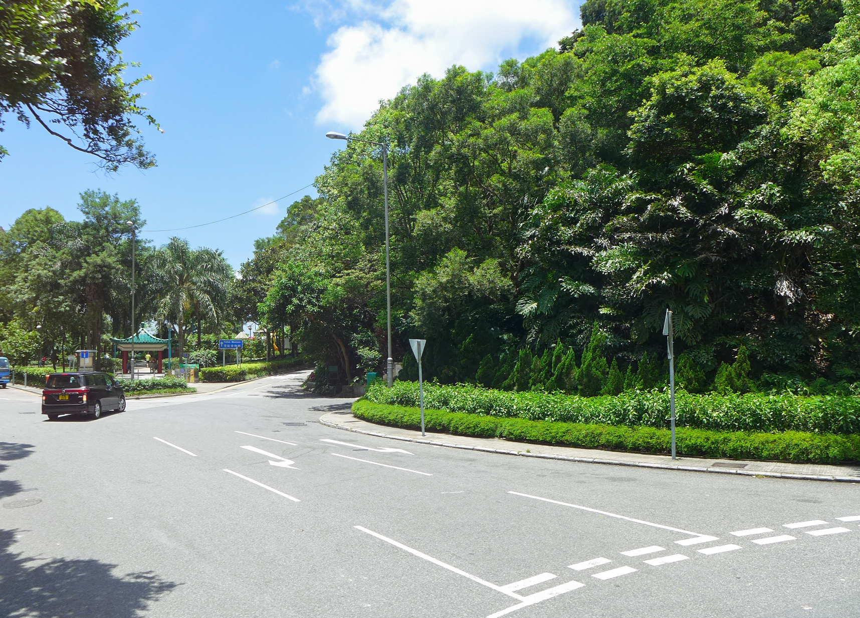 Wan Chai Gap